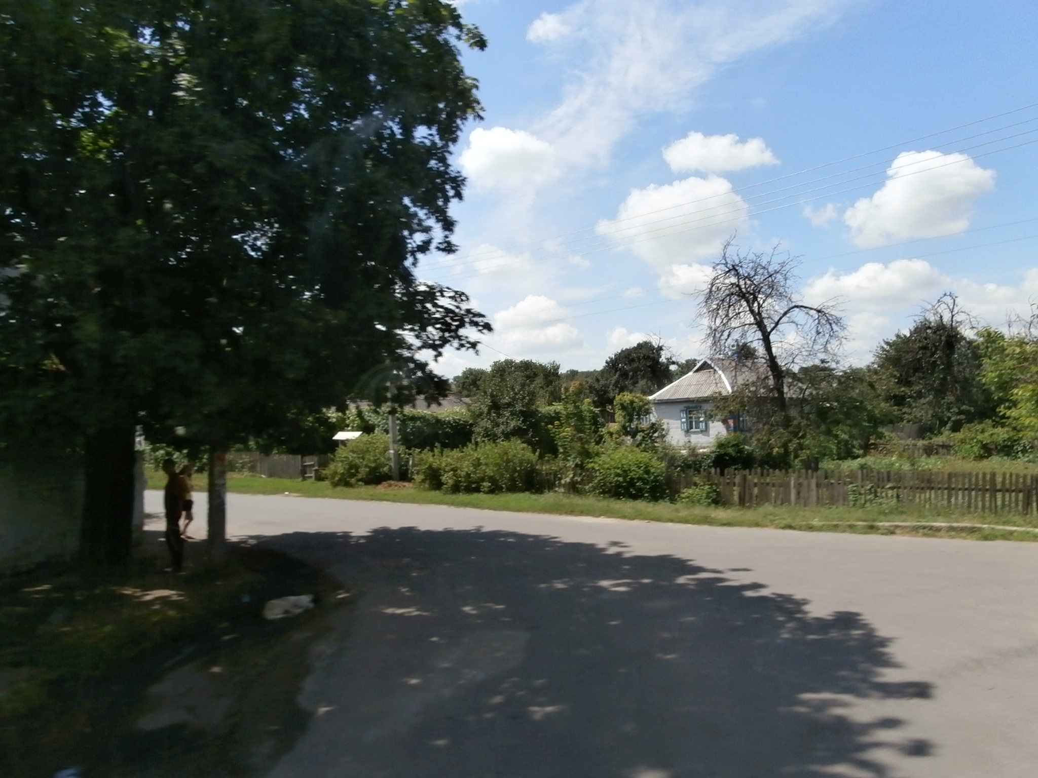 Poltawoboholjubiwka